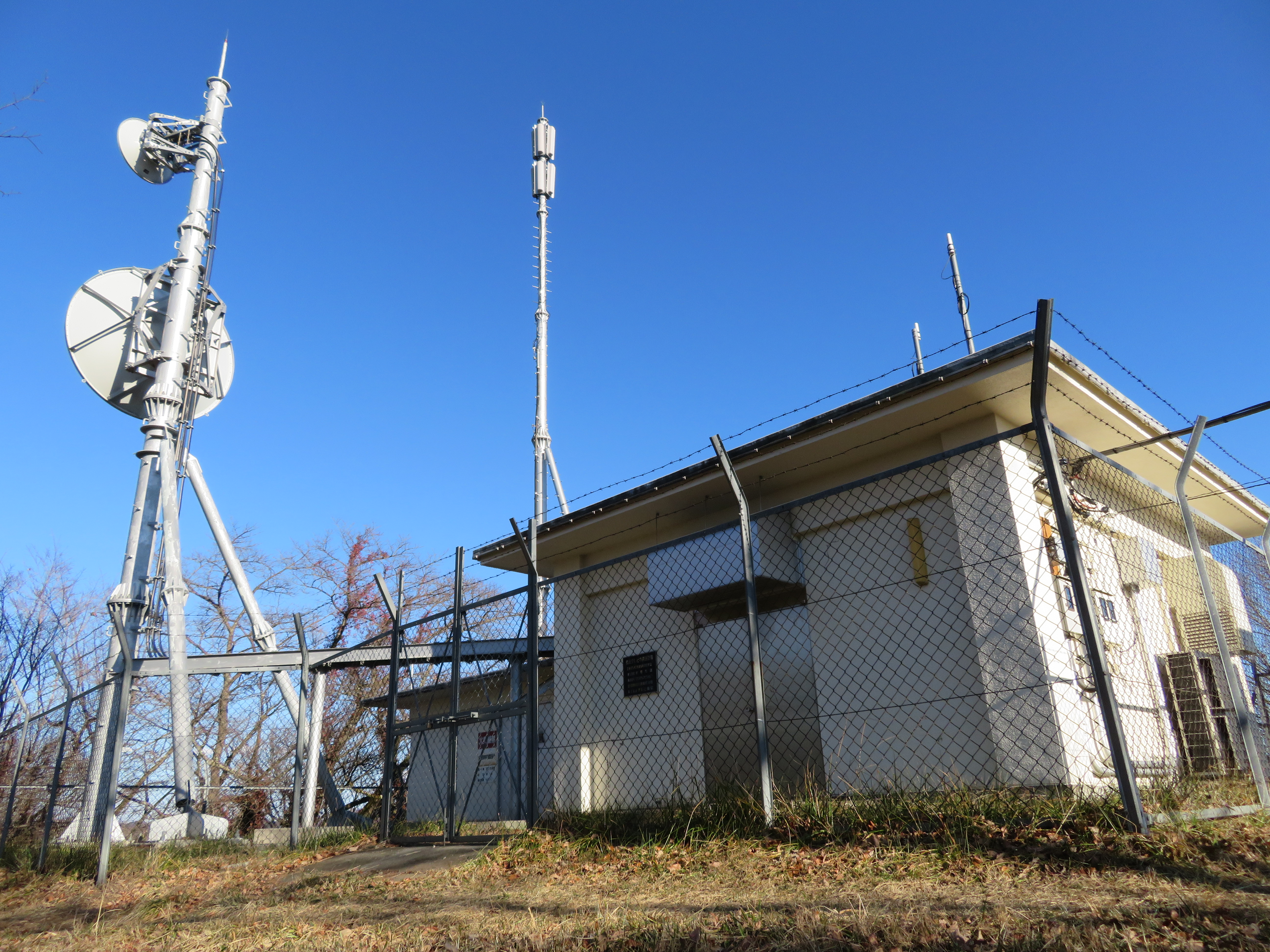 秩父テレビ・FM中継局（在京民放局舎と地上デジタル放送送受信アンテナ）